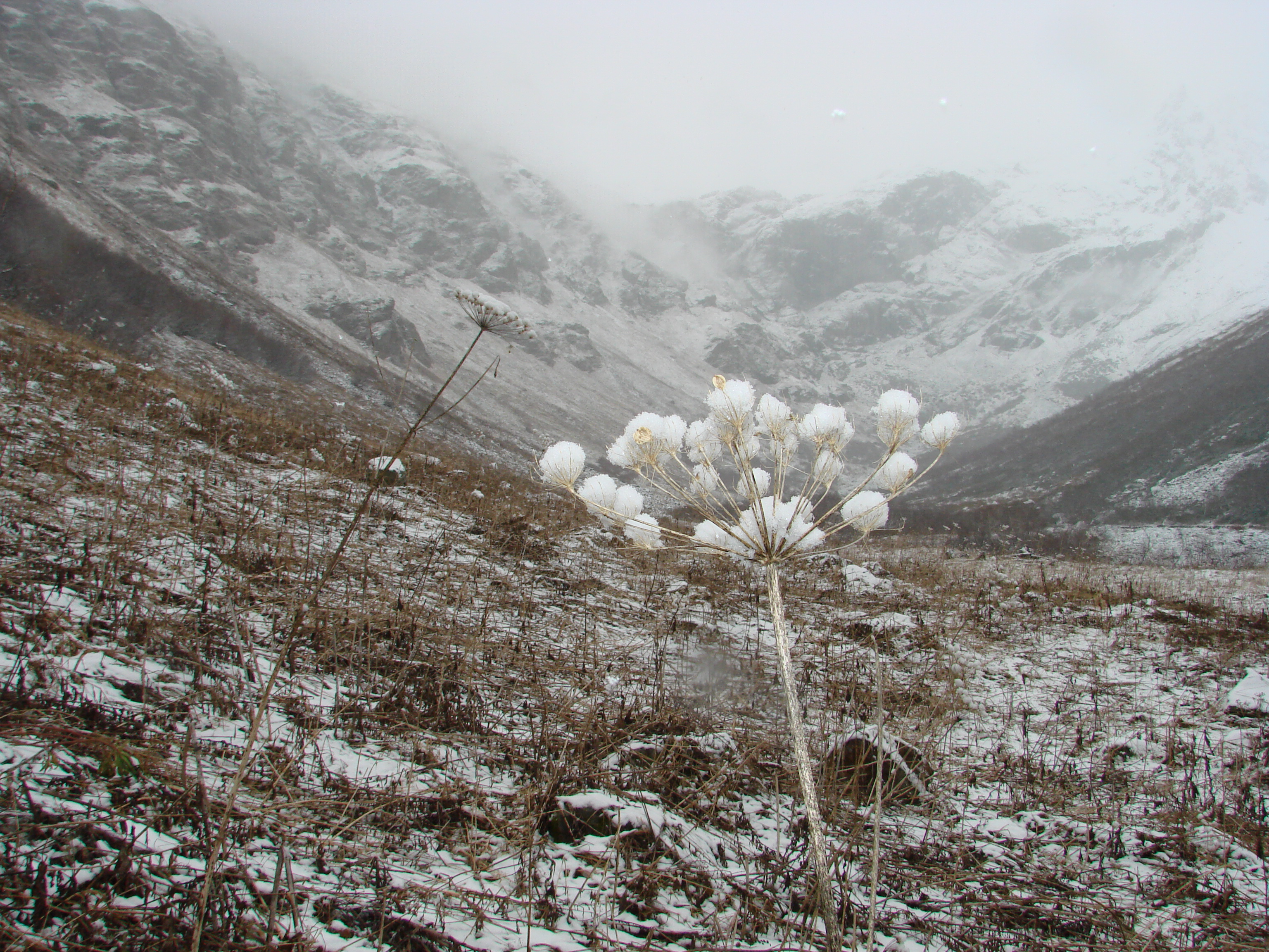 В ДАЛИ ЛЕДНИК БУША